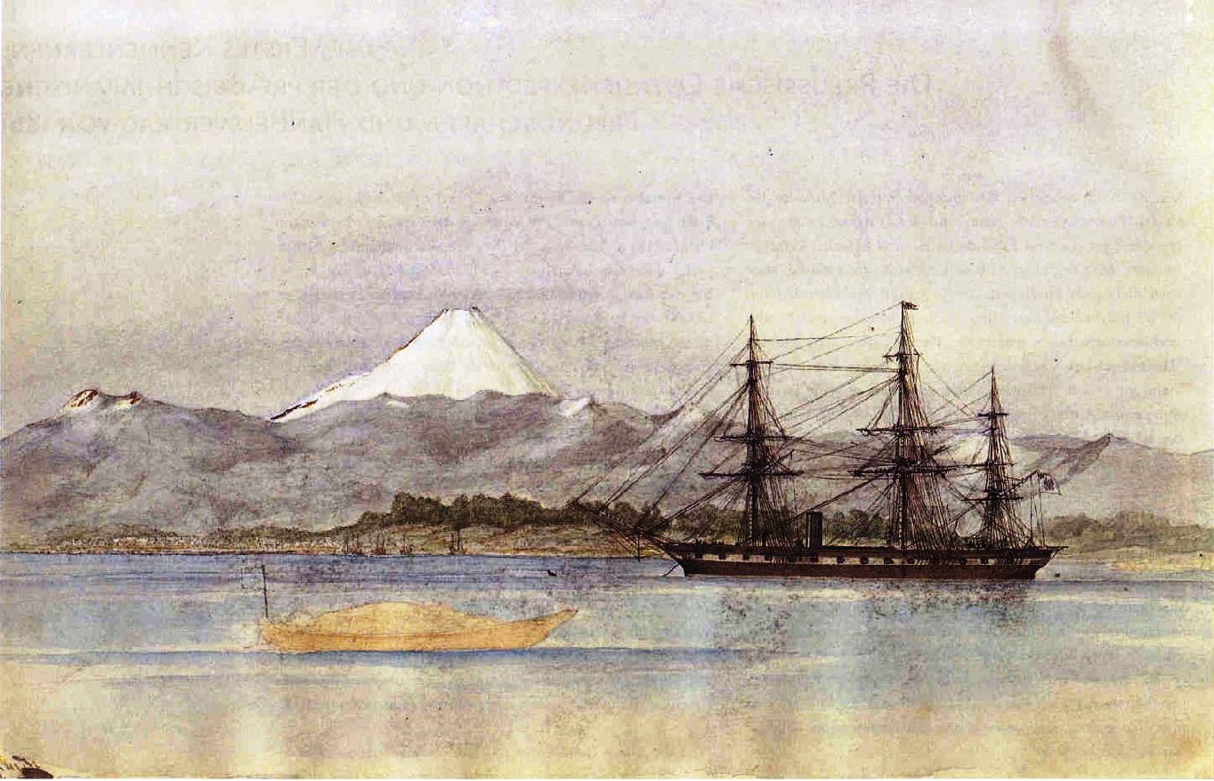 Die SMS Arcona, benannt nach dem nördlichsten Kap der Insel Rügen, war eine Gedeckte Korvette der Preußischen Marine, der Marine des Norddeutschen Bundes sowie später der Kaiserlichen Marine. Der Stapellauf erfolgte am 19. Mai 1858 auf der Königlichen Werft in Danzig. Aquarell das die Arcona in der Bucht von Yokohama zeigt.